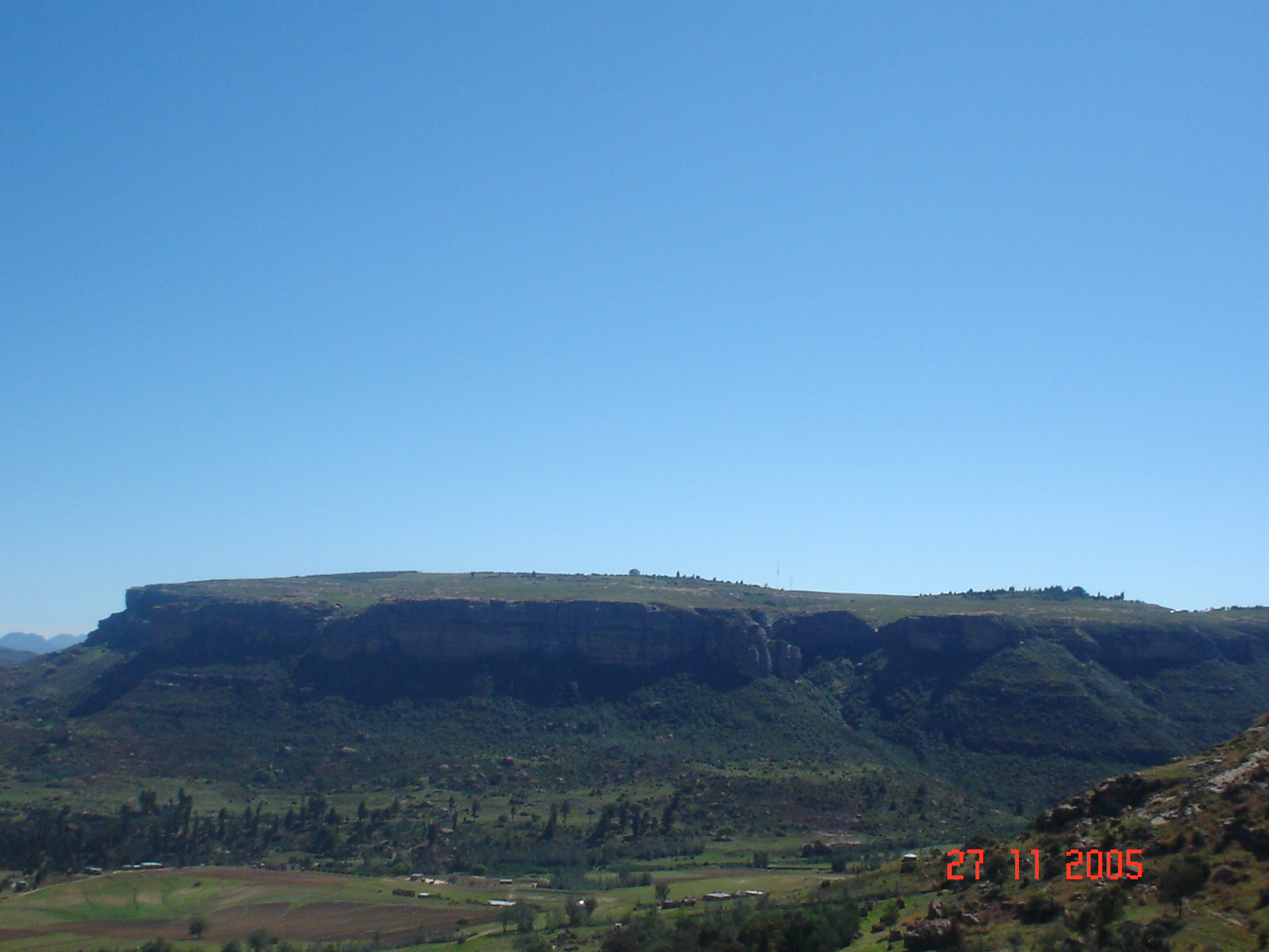 Leribe Plateau